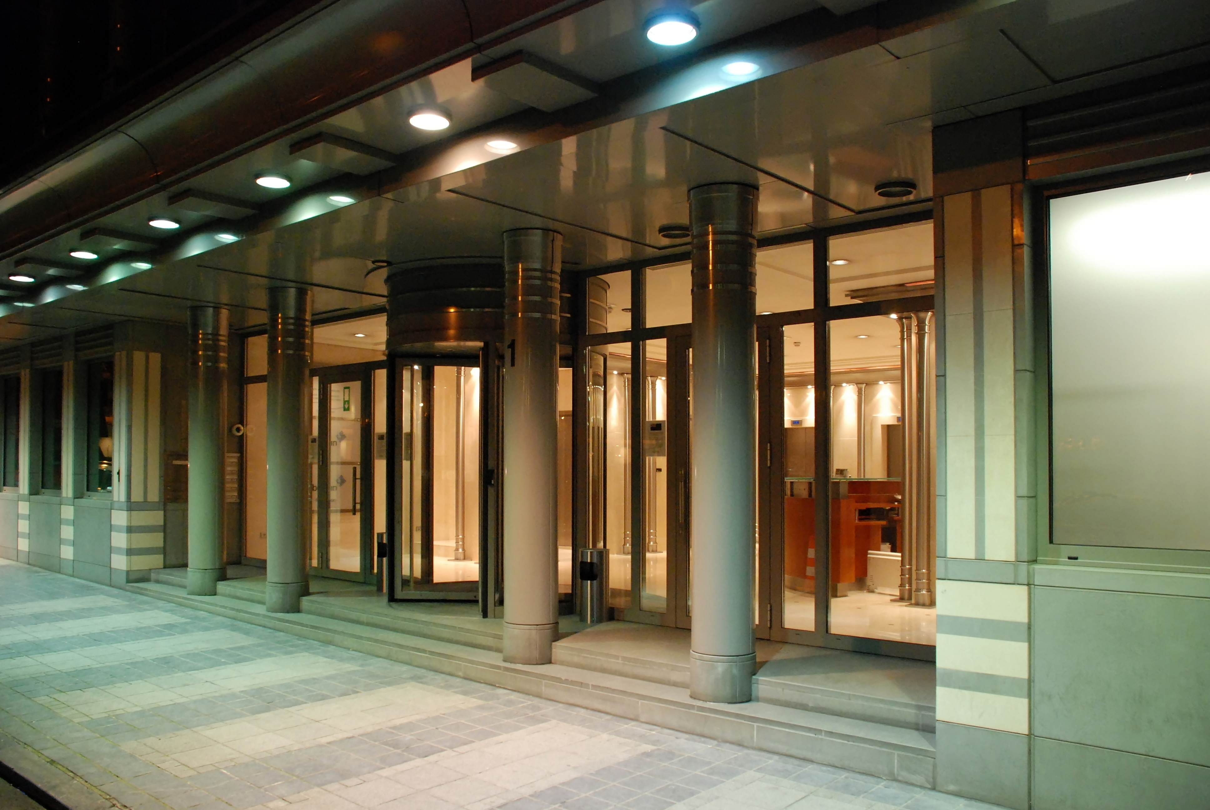 Belgique - Bruxelles - immeuble Dexia Meeus (Architecture postmoderne en Belgique - Atelier d'Art Urbain)